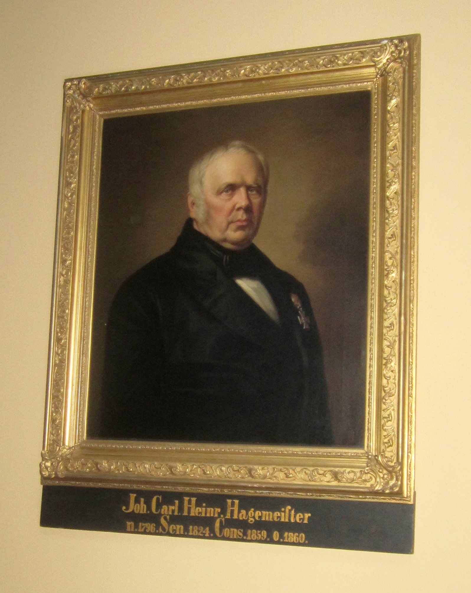 Johann Carl Heinrich Hagemeister (1796-1860)